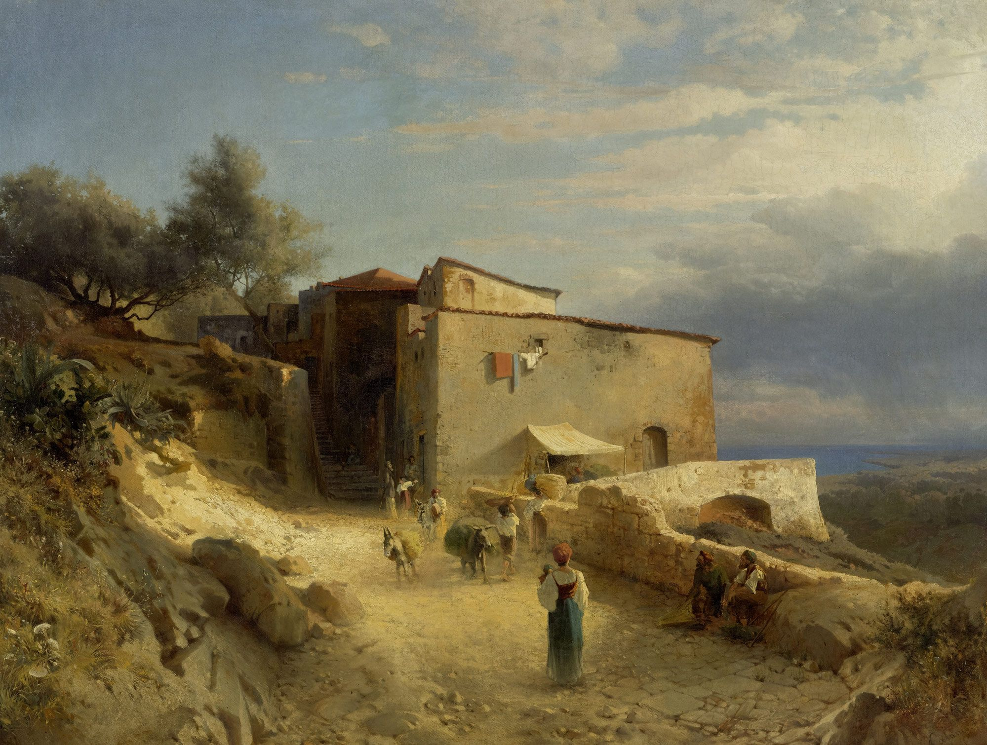 Italienisches Küstendorf. Öl auf Leinwand. Unten rechts signiert: A. Calame f. 61 x 82 cm.